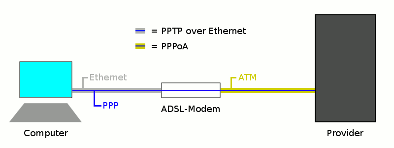 Protokollschichten bei einem ADSL-Anschluss über PPTP + PPPoA